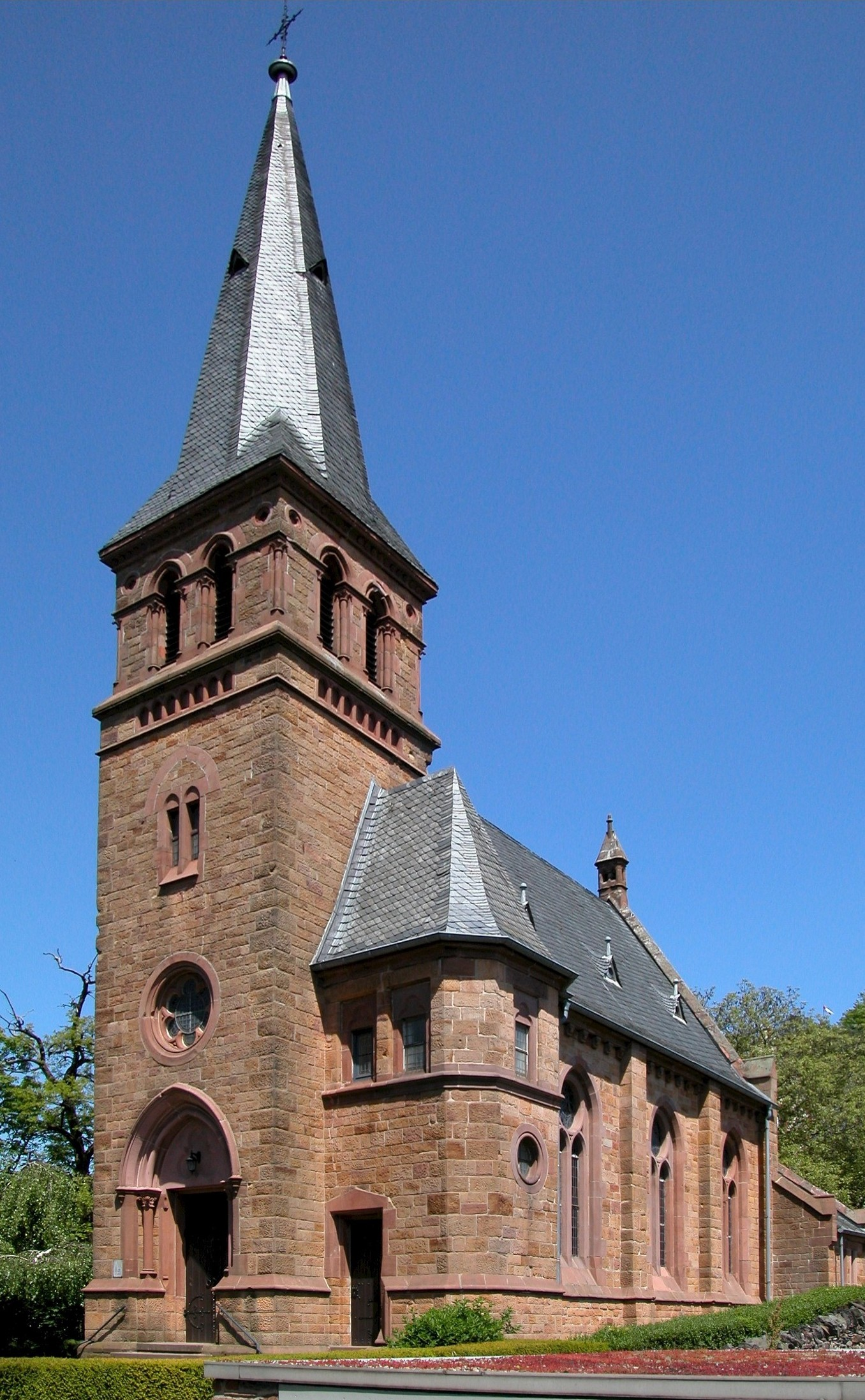 Evangelische Kirche in Saarburg, Rheinland-Pfalz; erbaut 1892-1893; unter Denkmalschutz